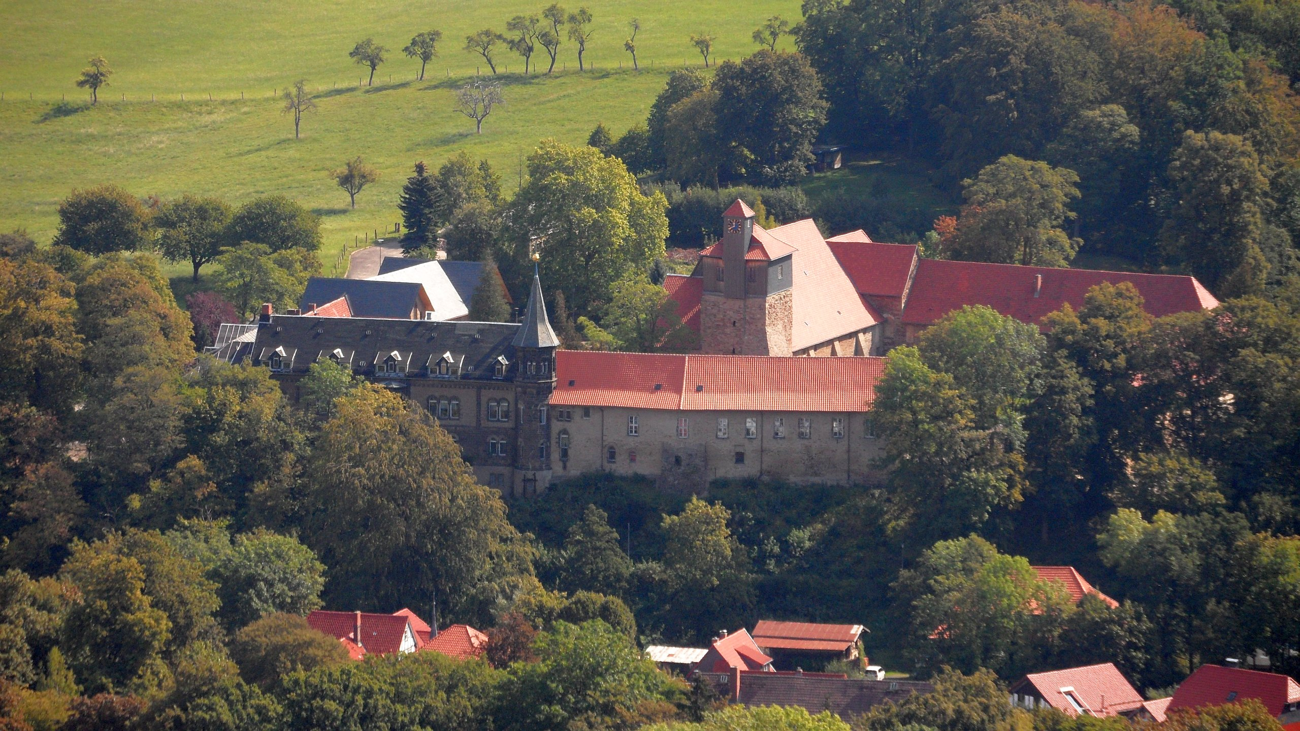 Schloss und Kloster Ilsenburg, aufgenommen vom Buchberg.